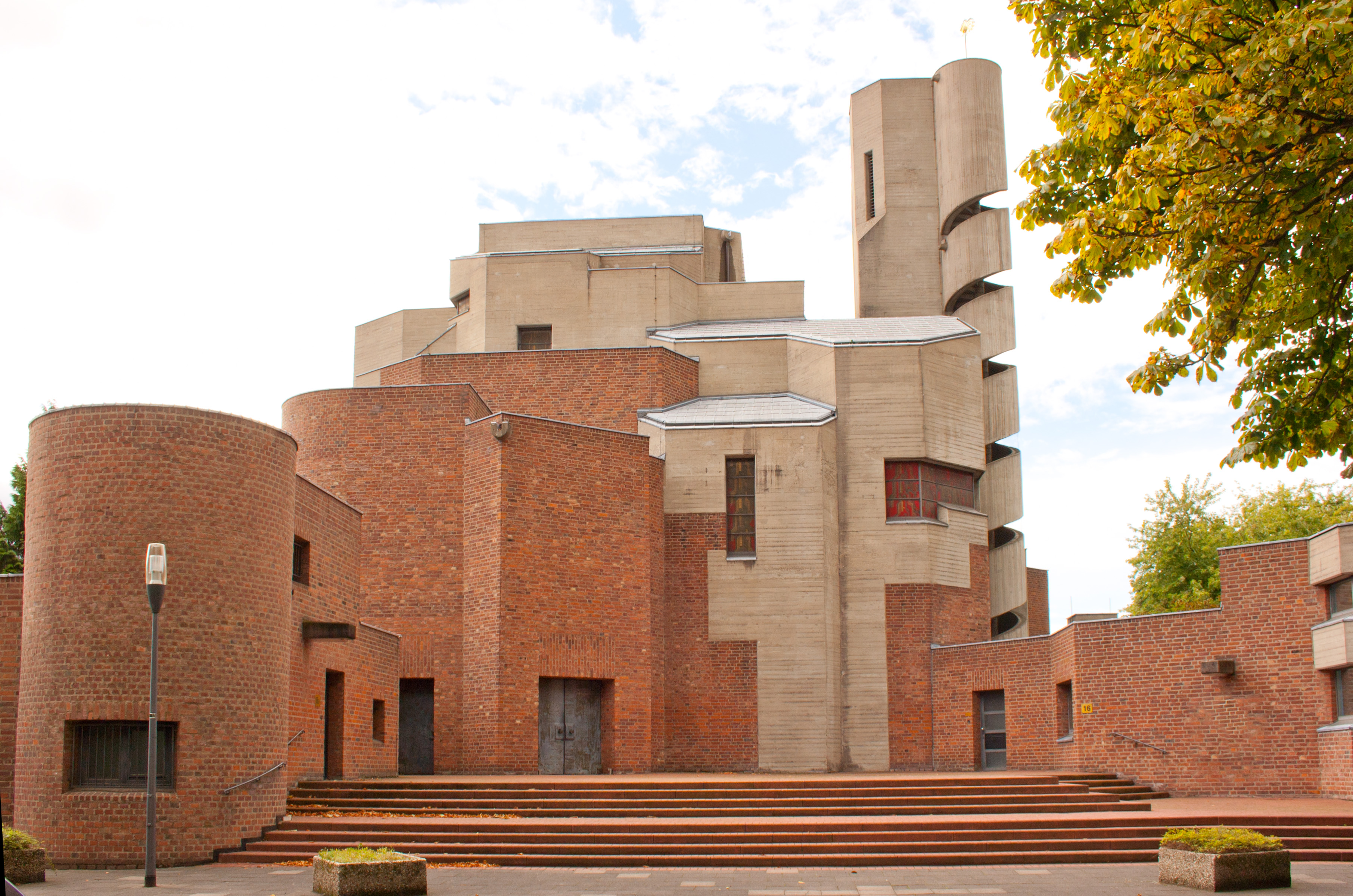 Kirche Christi Auferstehung, Brucknerstr. 16This is a photograph of an architectural monument.